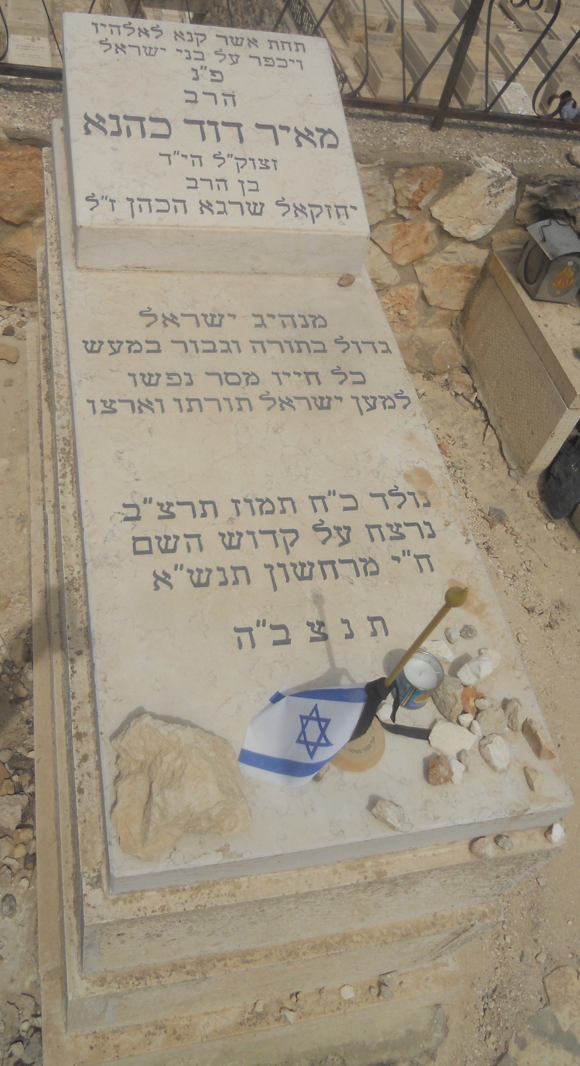 מצבת הרב מאיר כהנא